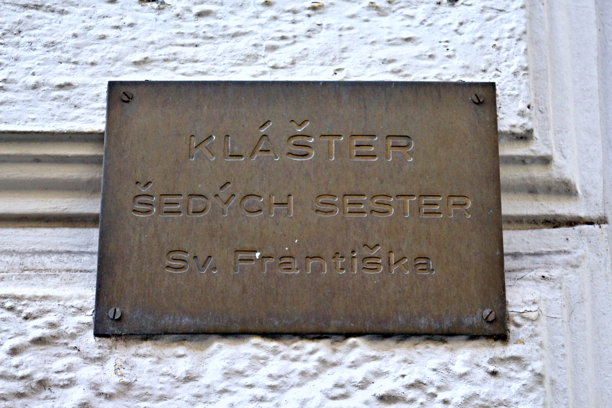 klášter šedých sester sv. Františka, Praha-Staré Město